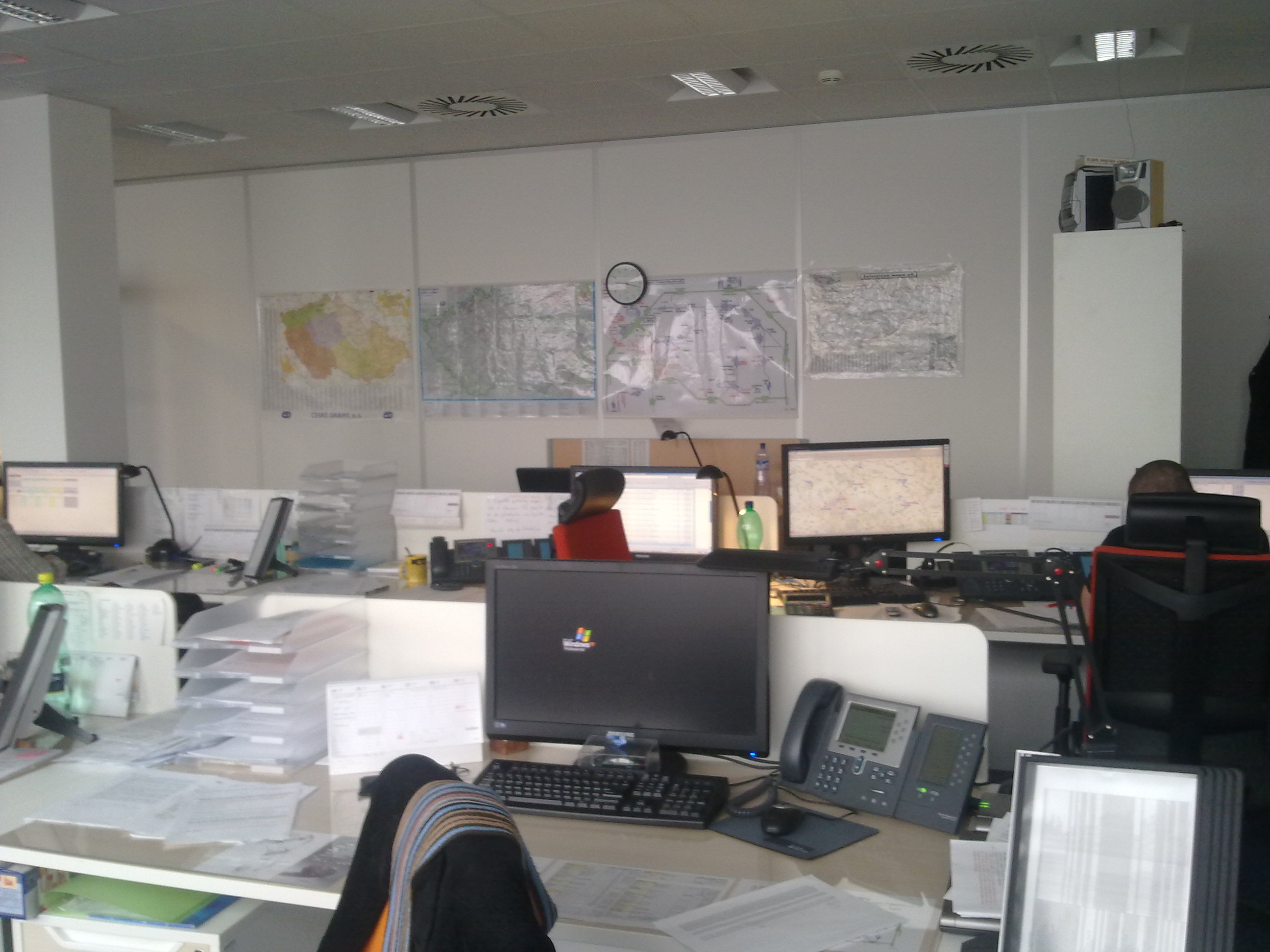 Železniční dispečink AWT Ostrava